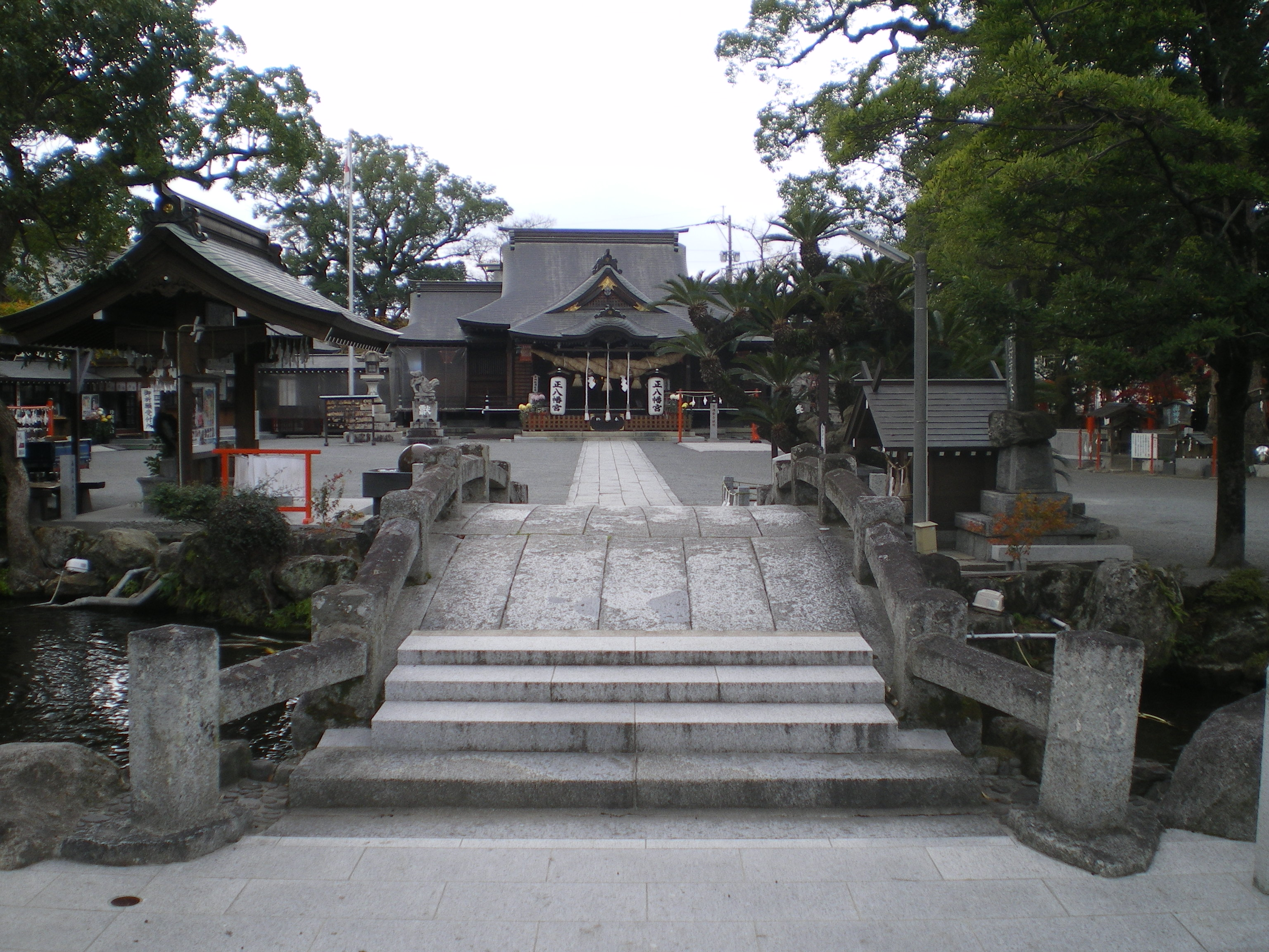 正八幡宮（神田町）